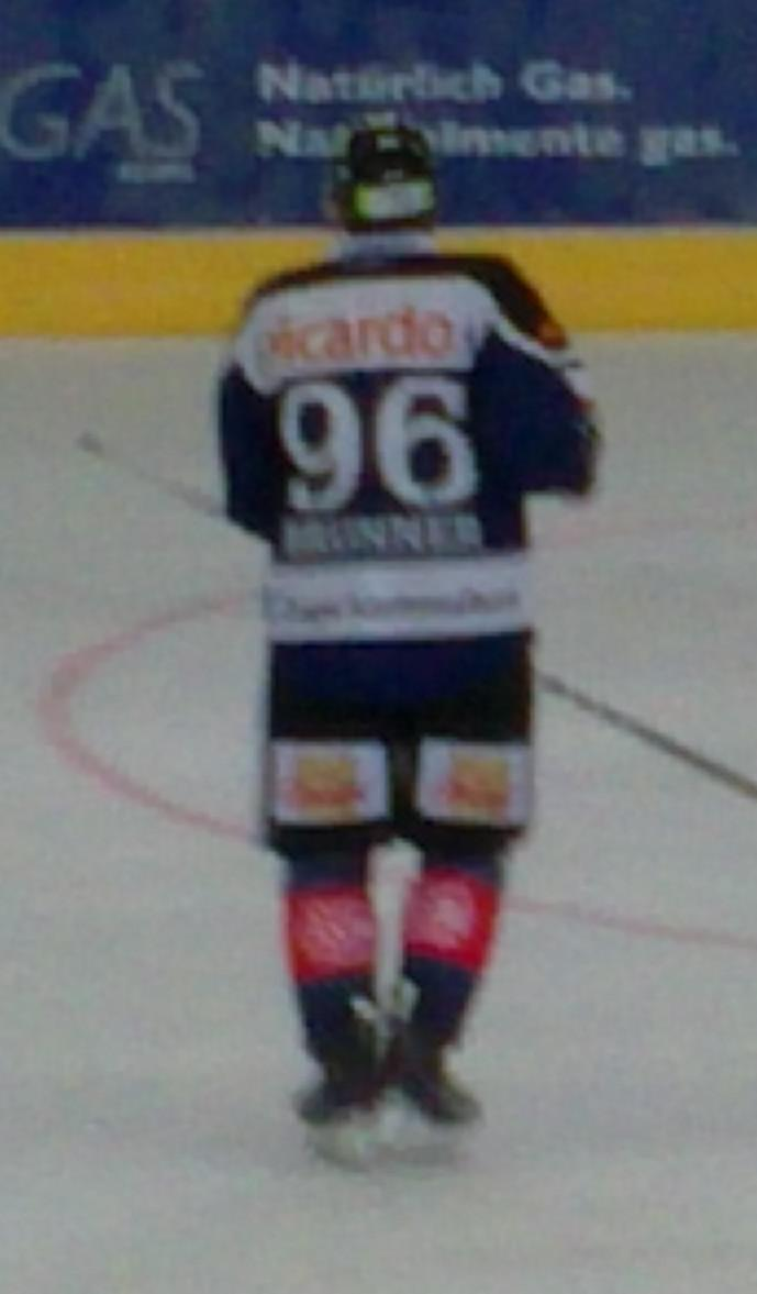 Damien Brunner im Trikot des EV Zug beim Dolomitencup 2010 in Bruneck